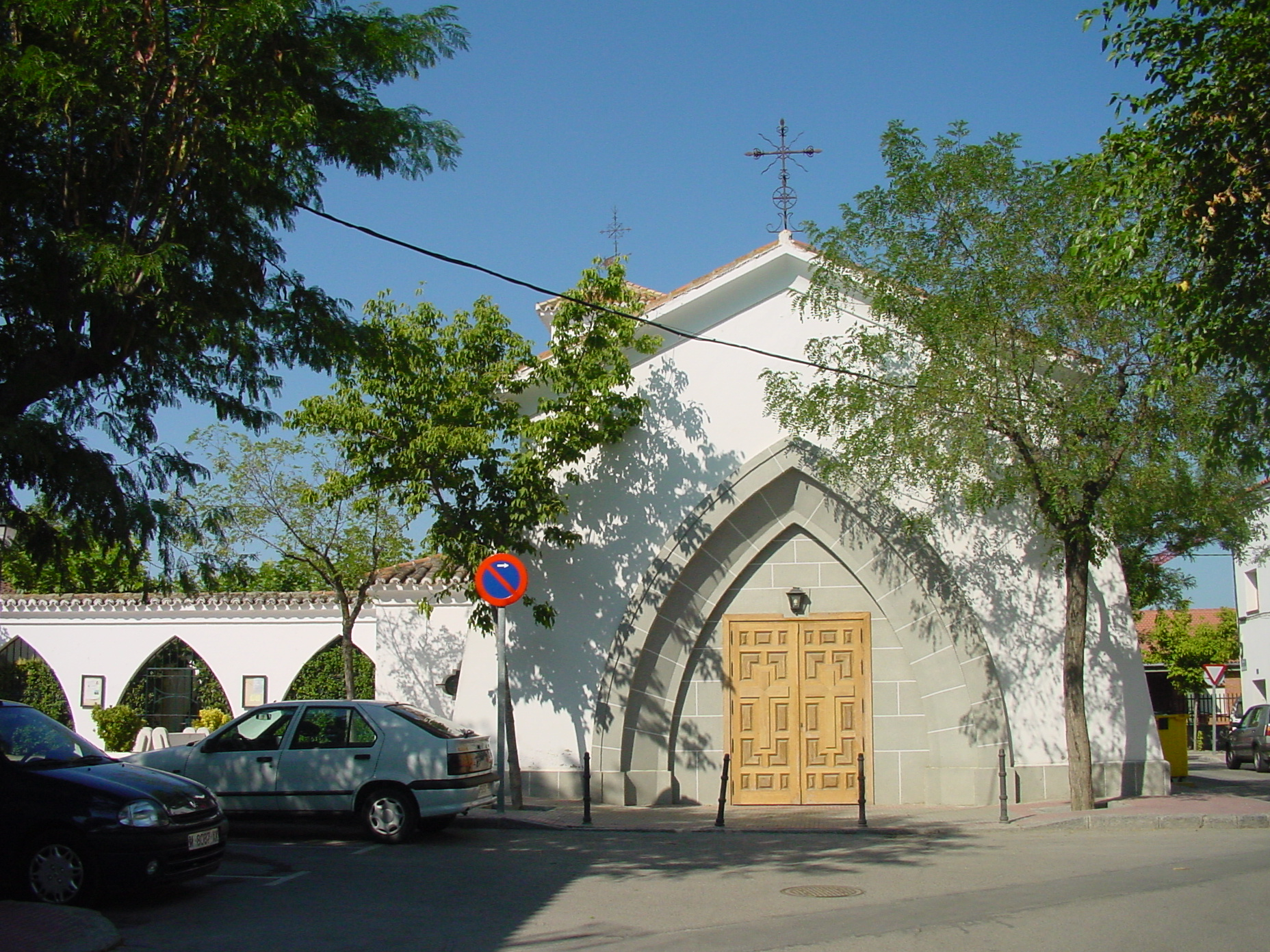 Iglesia en Villanueva del Pardillo.